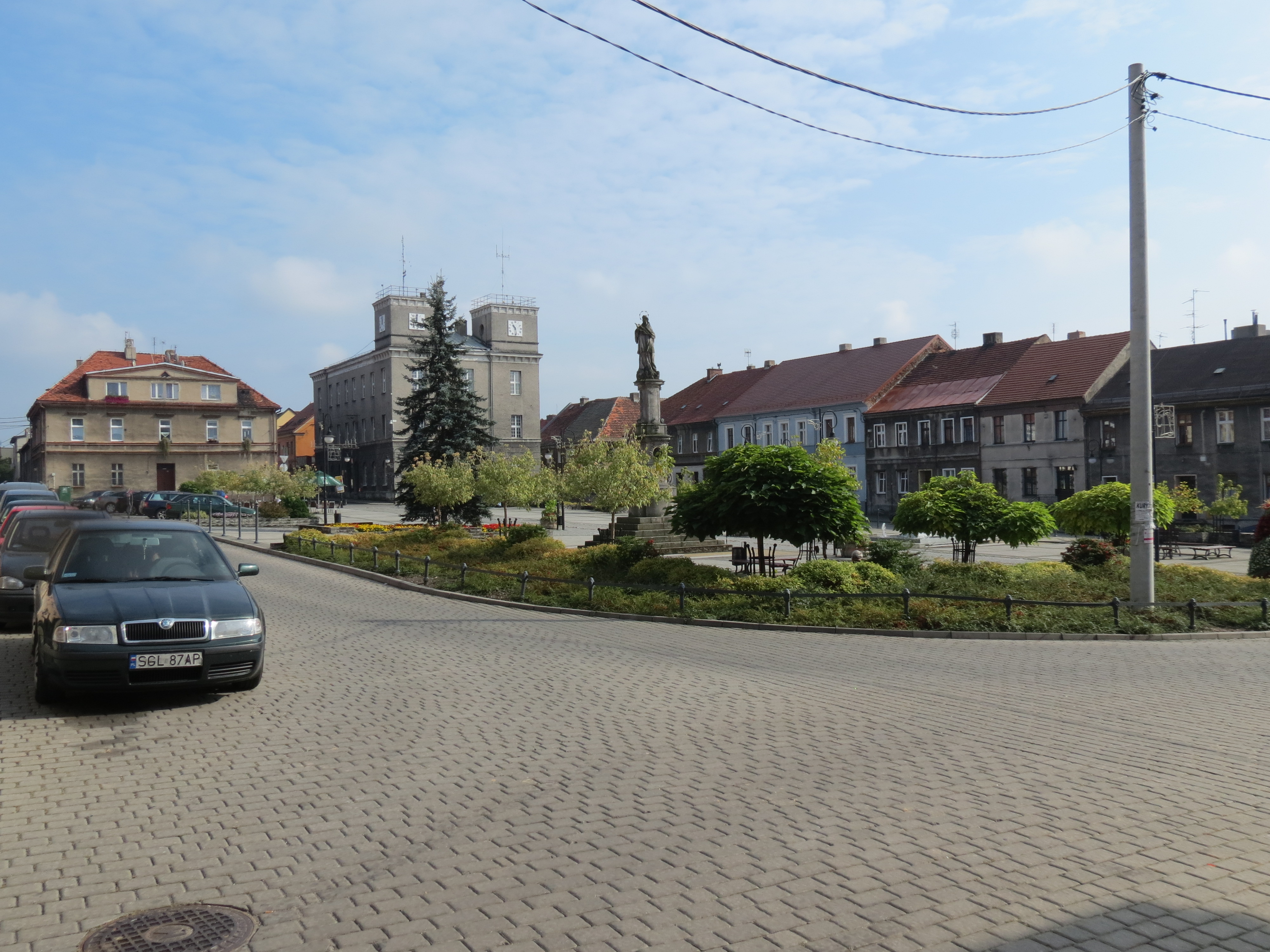 Toszek, miasto w ramach historycznego założenia